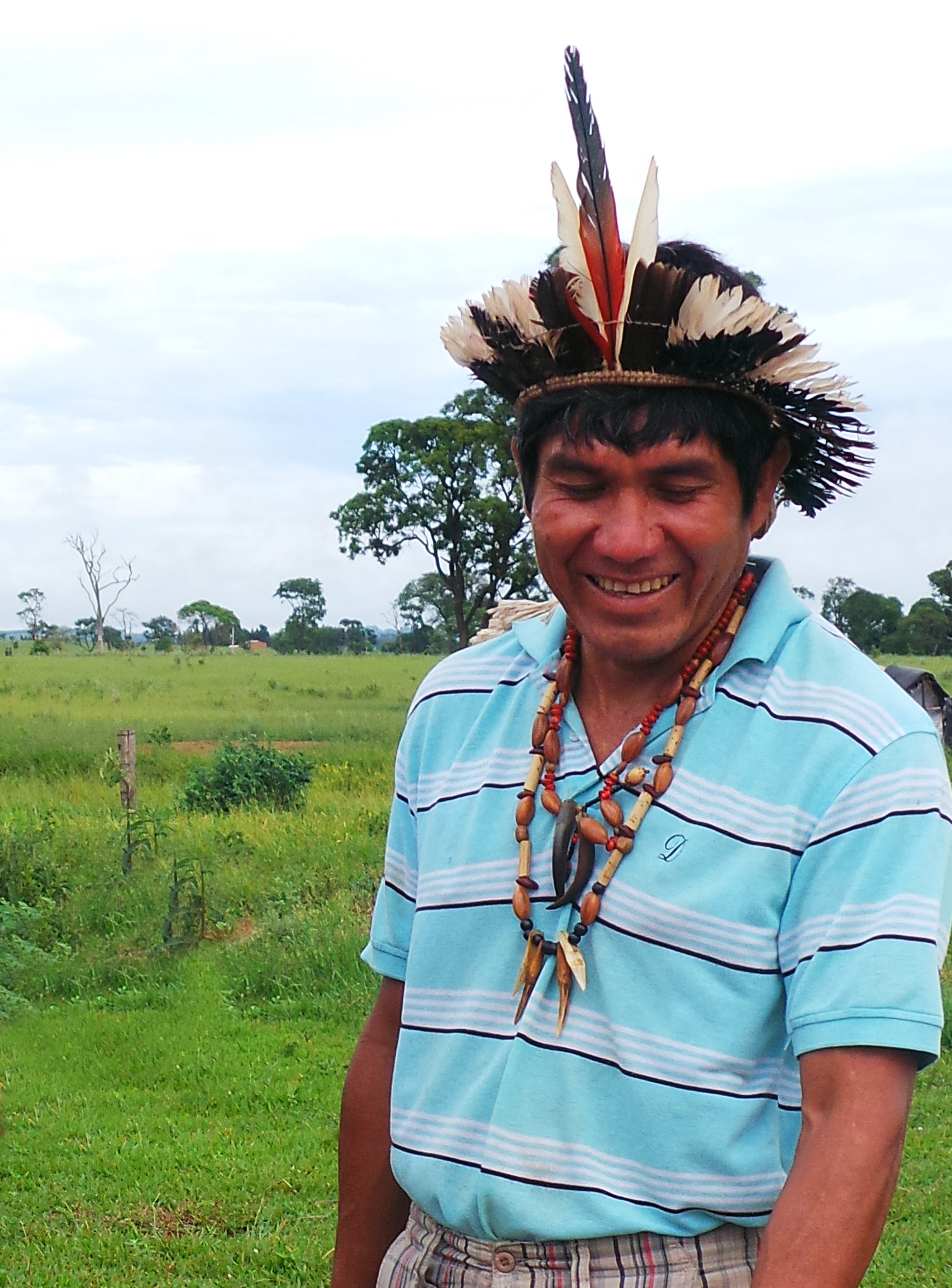 Cacique Guarani-Kaiowa Ladio Veron, aldeia Takwara, Caarapò, mato Grosso do Sul, Brasil (Foto: Gian Marco Longato)